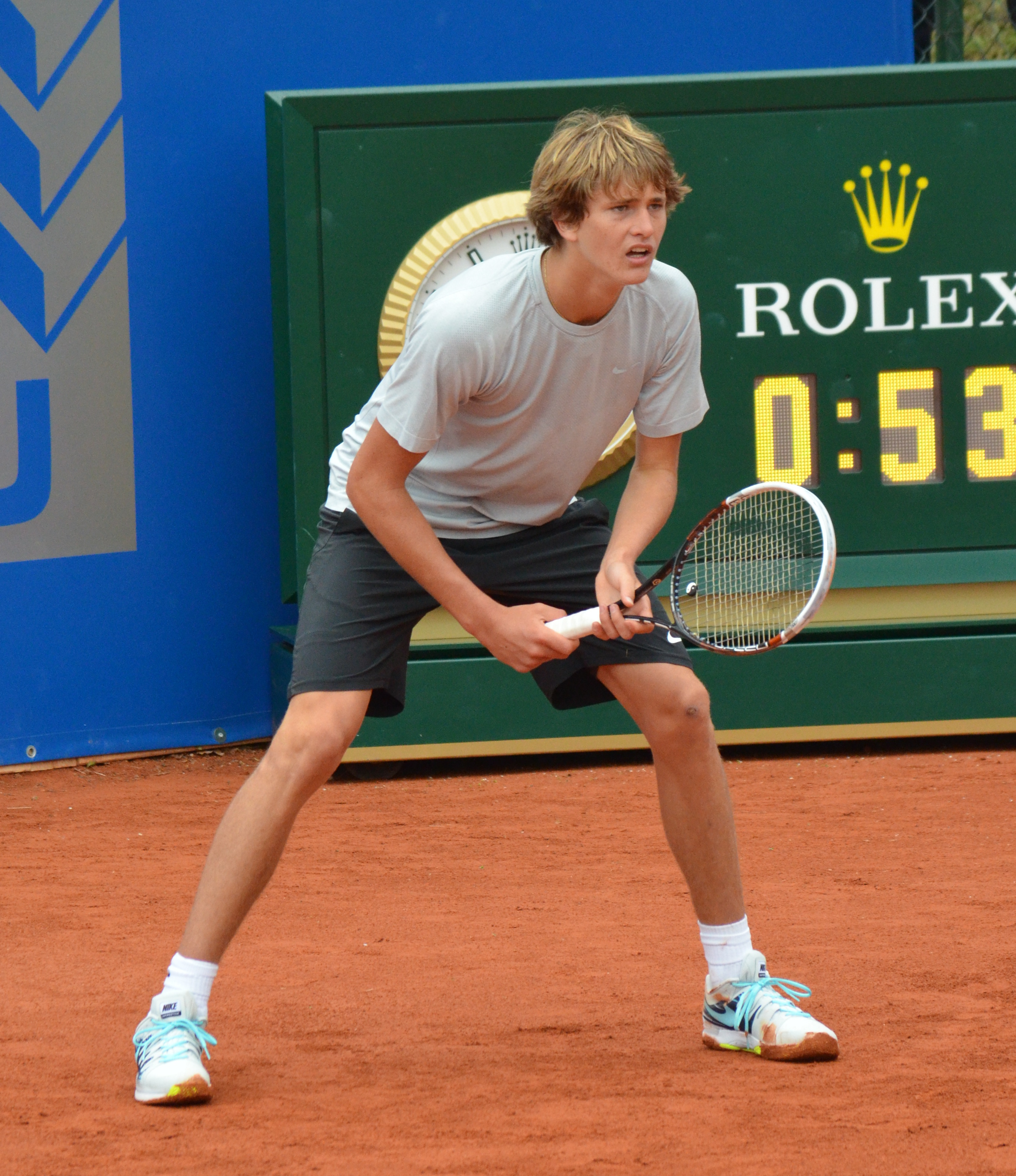 Alexander Zverev in der Begegnung gegen Jürgen Melzer bei den BMW Open 2014